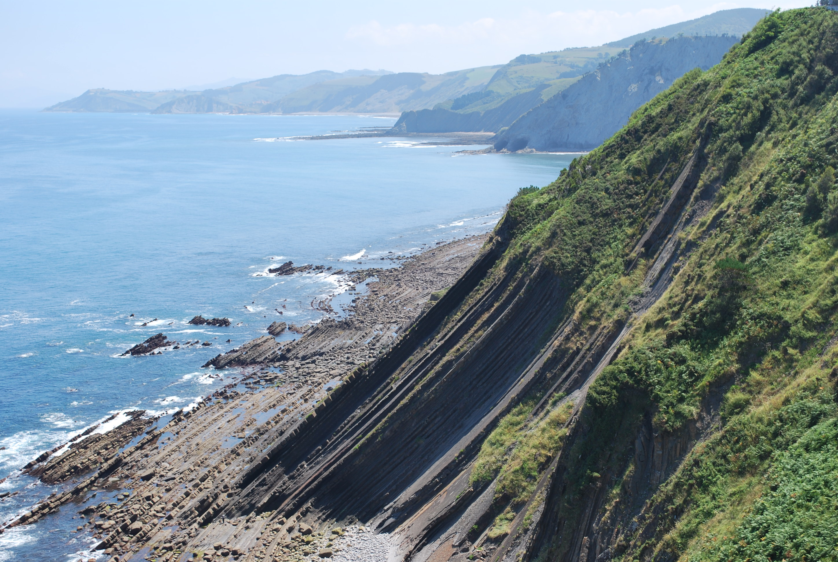 Route vers Zumaia à la sortie de Deba (Guipuscoa).